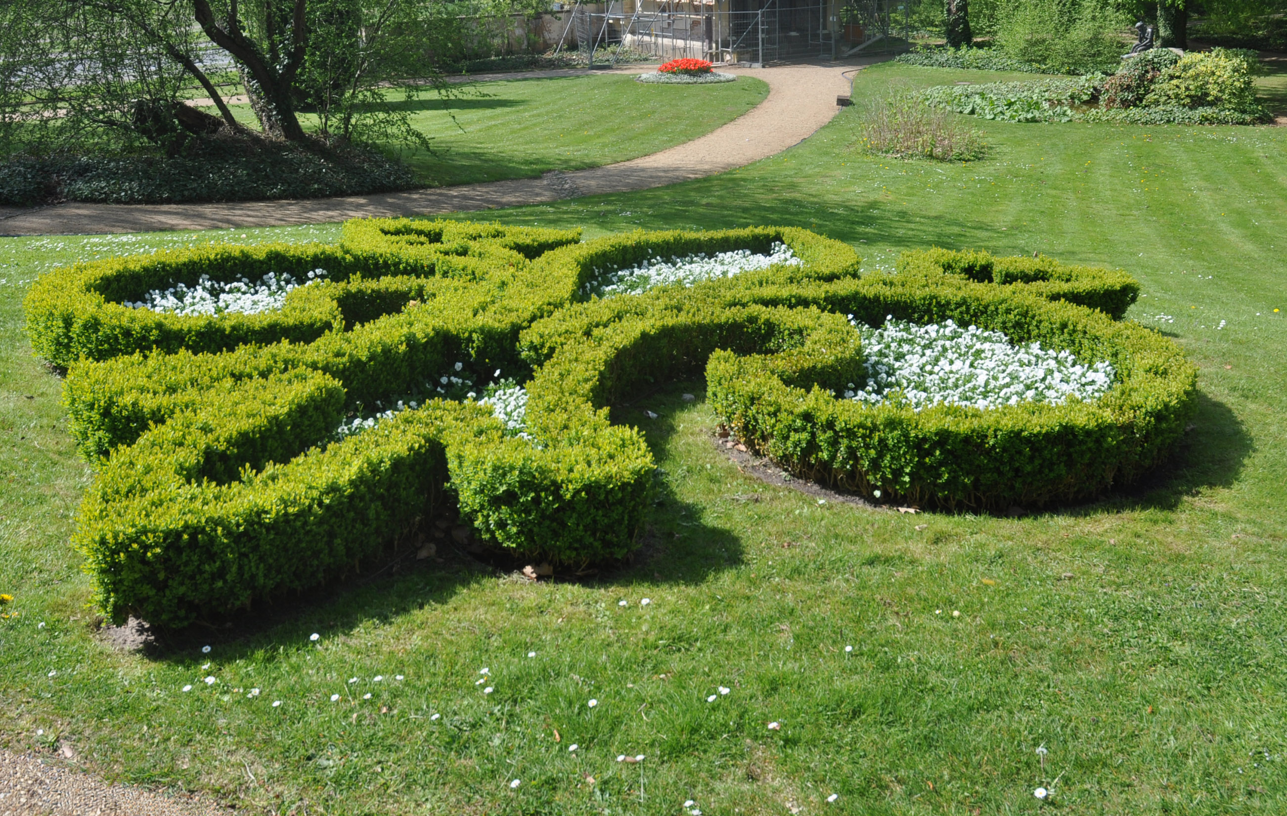 Park Klein-Glienicke, Beet in Lilienform am Schloss